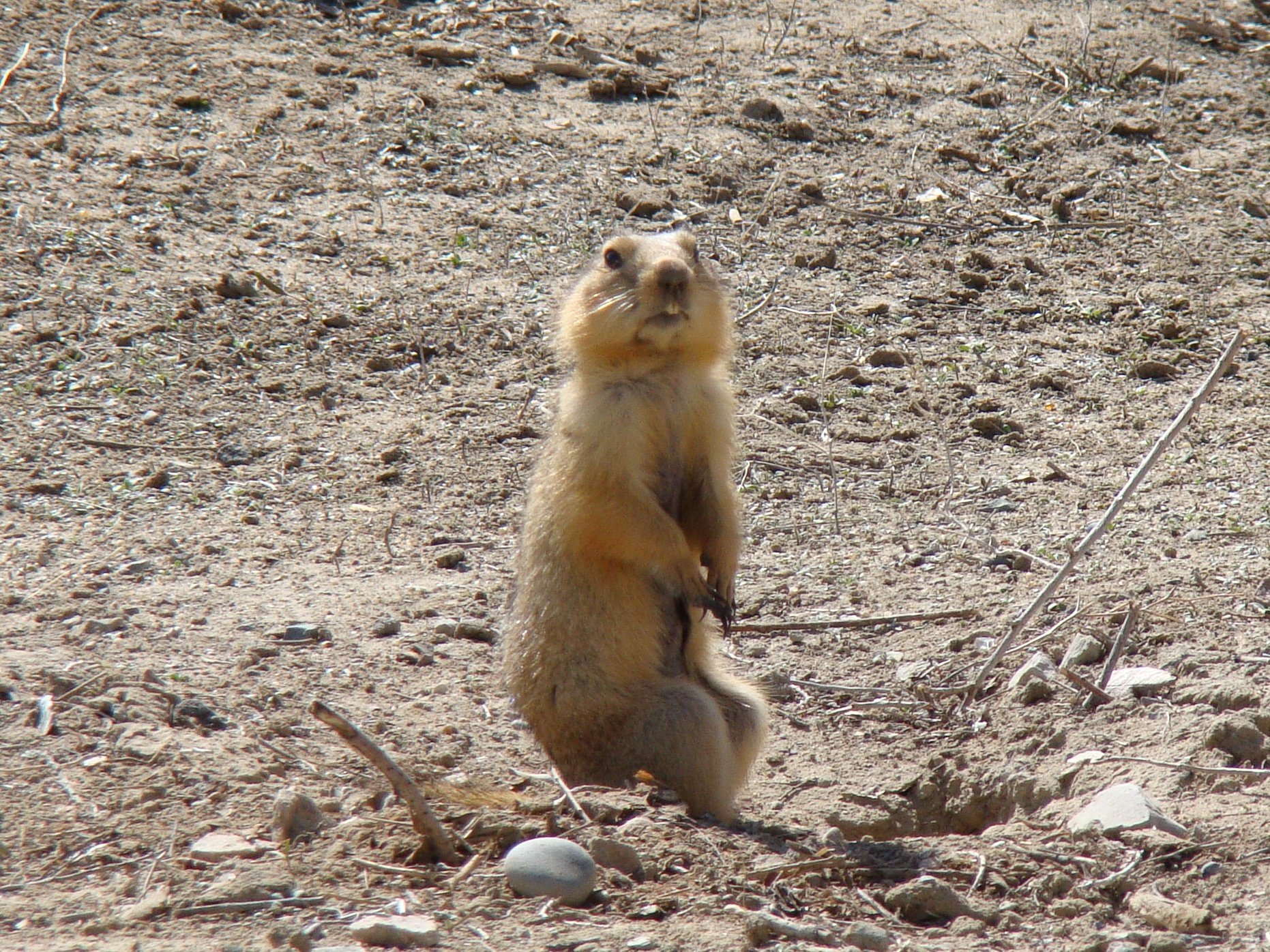 Суслик жёлтый (Spermophilus fulvus). Город Байконур, Кызылординская область, Казахстан